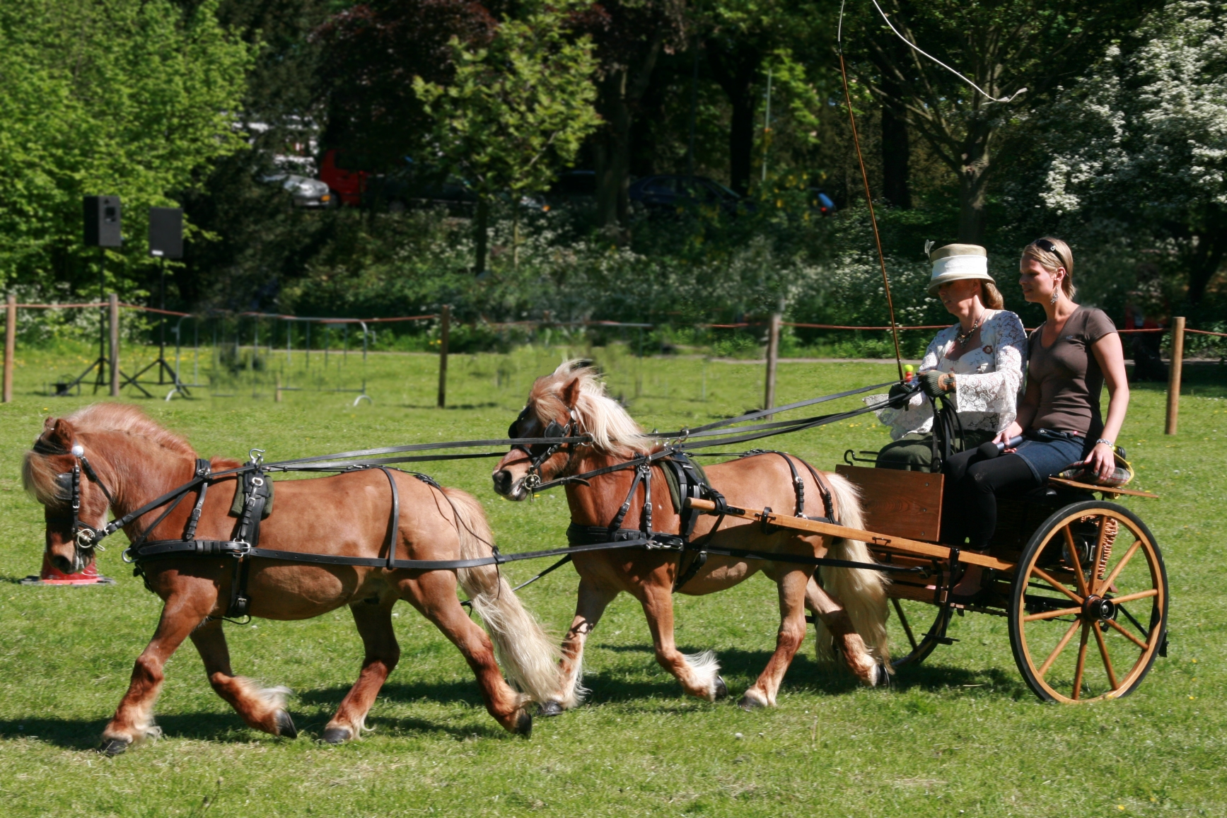 Wagen getrokken door twee paardjes, in tandem. Eigen foto, 30 april 2007